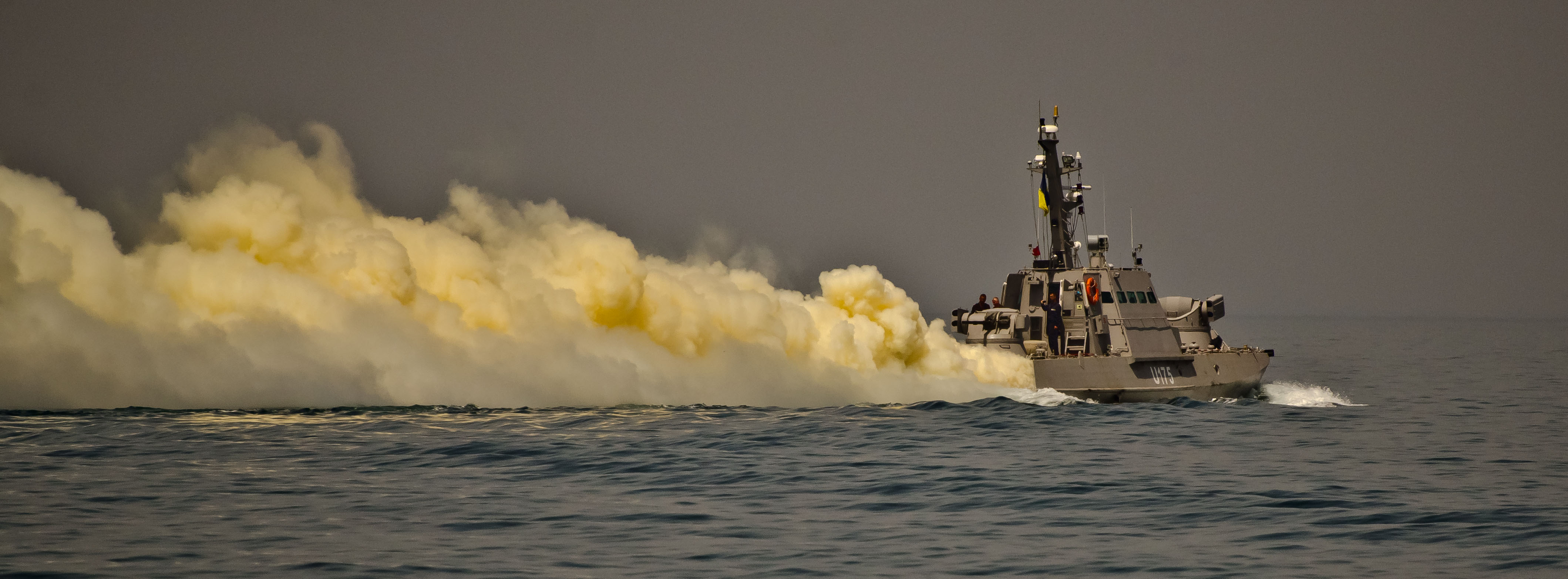 Швидкий хід та потужна зброя бронекатеру "Аккерман" (U-175) ) - запорука оборони узбережжя Маріуполя. Державні іспити та ходові випробування в морі тривають. Два новозбудовані для Військово-Морських Сил Збройних Сил України малі броньовані артилерійські катери в ході випробувань у відкритому морі здійснили спільне плавання. Під час виходу у складі тактичної групи катерів перевірено роботу систем і механізмів у штормових умовах. Матеріальна частина працювала в штатному режимі. Фото: Євген Силкін